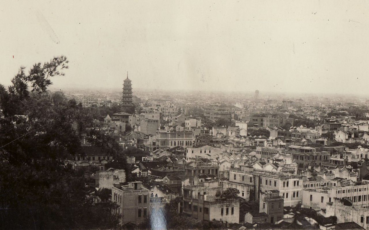 1940年代，日本侵華時期的廣州市區，遠處可見六榕寺花塔。